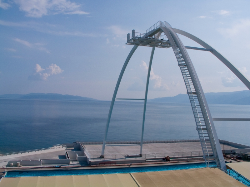 Stari bazen na Kantridi, Rijeka